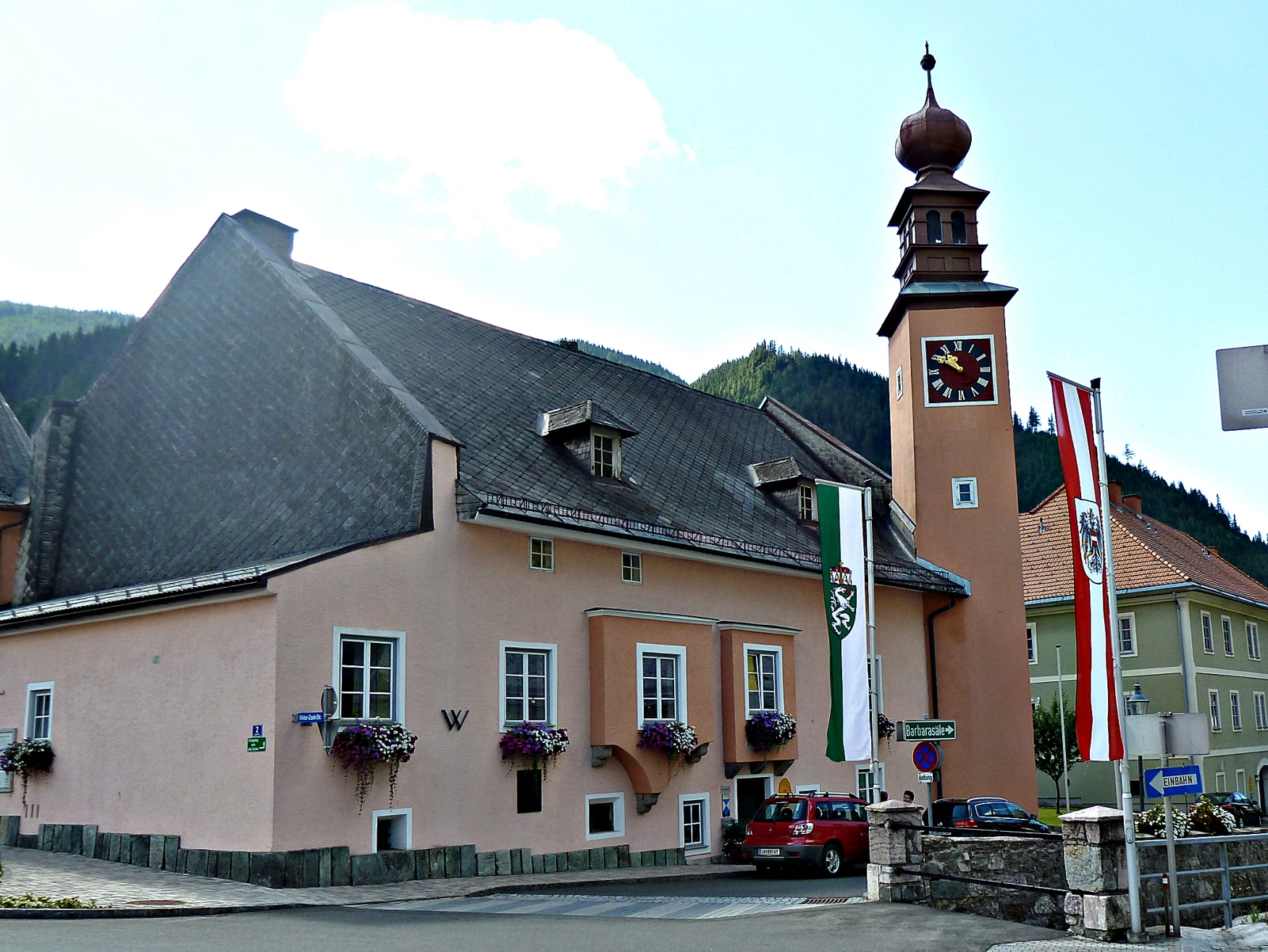 Rathaus Vordernberg